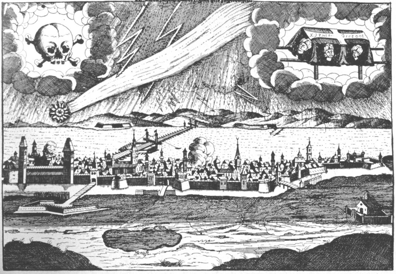 Ausschnitt / Detail. Einblattdrucke einer Kometenerscheinung 1687 / Leaflet of a comet. Original: Image:Wahre und eigentliche Abbildung eines Entsetzlichen Wunderzeichens.jpg